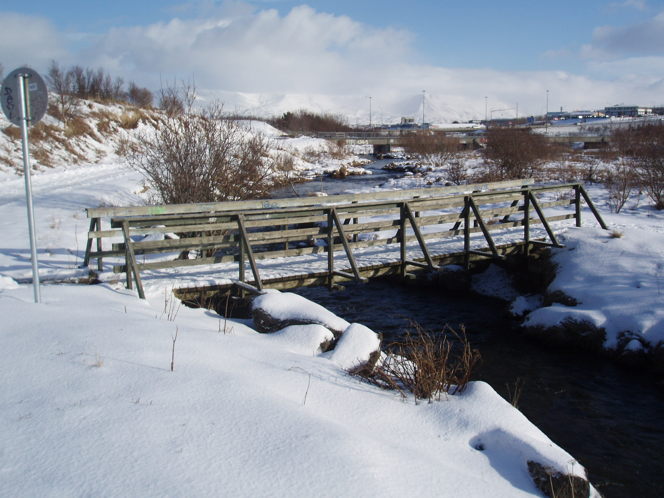 Göngubrú í Elliðaárdal í Reykjavík, Íslandi í mars 2007 Bridge to walk on in Ellidaardalur in Reykjavik, Iceland, March 2007